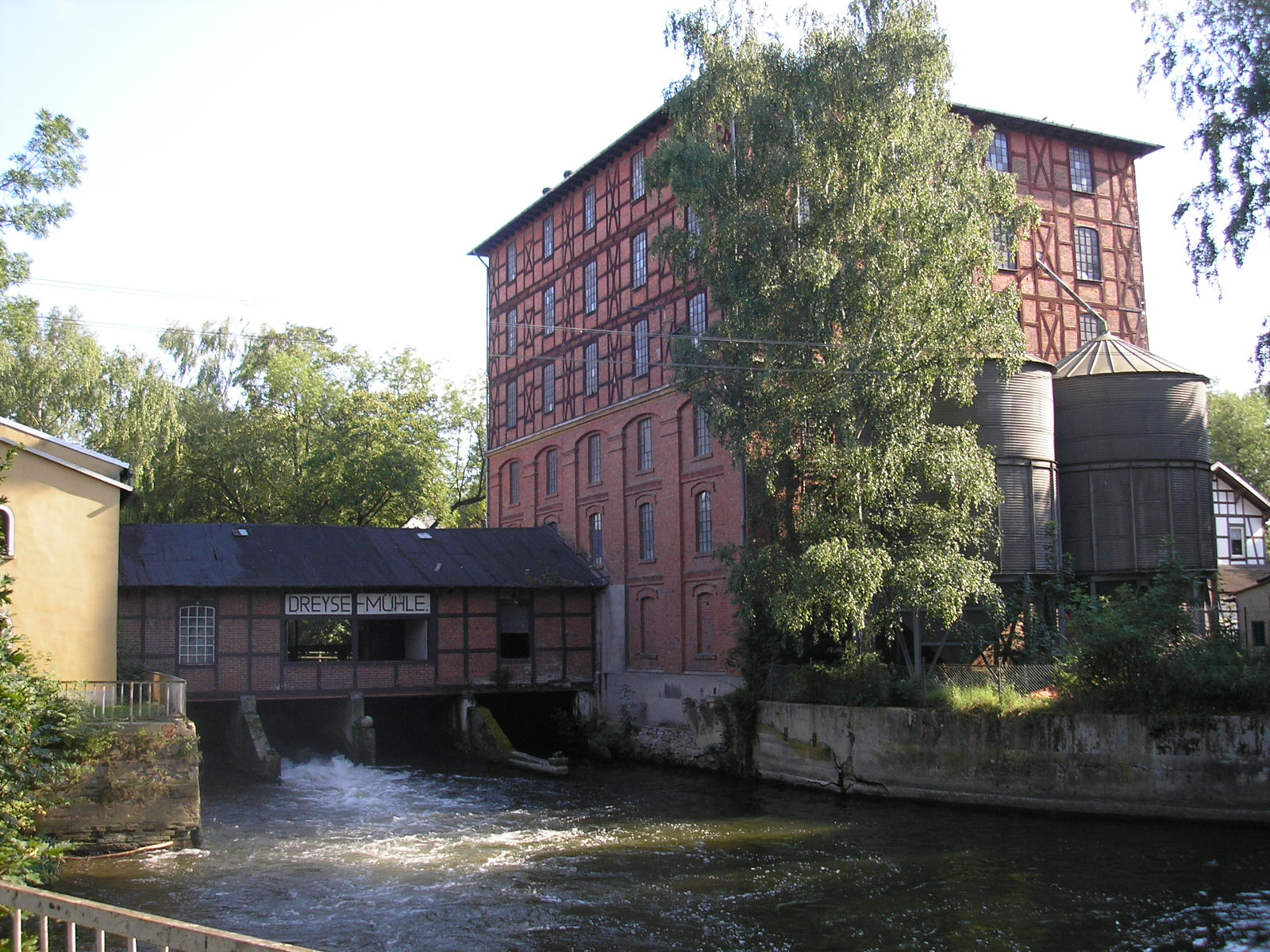 Die Dreyse-Mühle an einem Unstrut-Graben in Sömmerda (Thüringen).